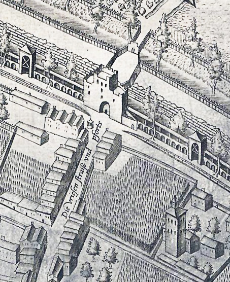 Ausschnitt des Mercator - Stadtplanes, Bereich Friesentor und Straße. Westliche Stadtmauer Köln